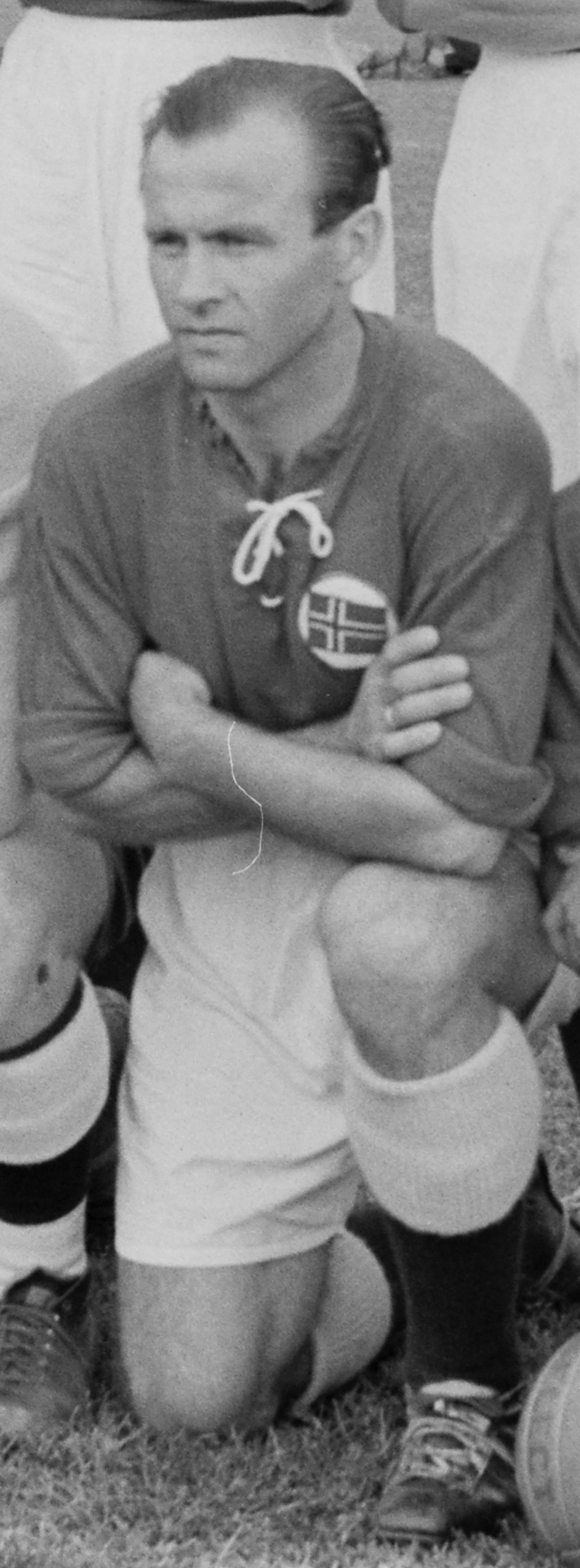 Bildet er hentet fra Arkivverket. Landskamp Norge-Danmark, Ullevål Arkivinstitusjon : Riksarkivet Arkivnavn : Billedbladet NÅ Sted : Norge, Oslo, Oslo, Ullevål stadion Emneord: Fotball, Menn, Landslag Avbildet: Bak fra venstre: Per Knudsen, Arne Kotte, Thor Hernes, Gunnar Dybwad, Finn Gundersen, Harry Kure. Foran fra venstre Thorleif Olsen, Arne Bakker, Asbjørn Hansen, Harry Boye Karlsen, Arne Legernes.